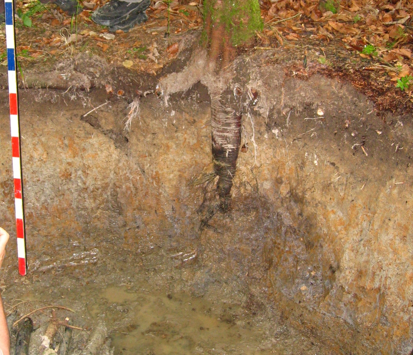 Pelosol-Pseudogley auf Löss über ku-Ton (Sulz am Neckar). Standort 574 m ü. NN, 800mm ND, T 7°C, Exp 260°, Inkl 2°, Plateau, Tannenschonung mit Altholz.